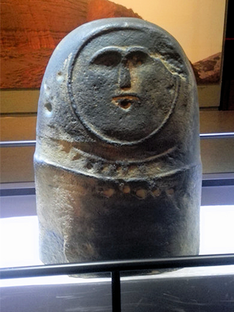 石像，拍摄于新疆维吾尔自治区博物馆